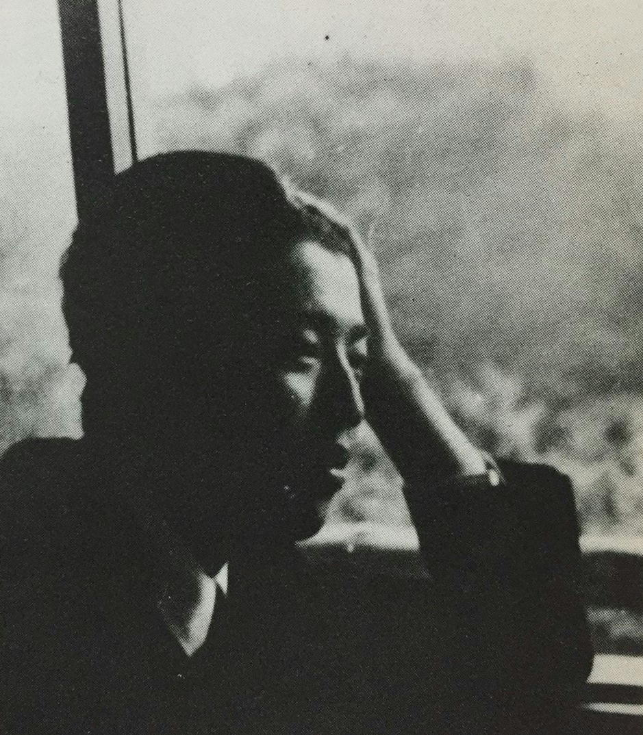 撮影時期は1940年頃。場所は群馬県水上温泉。